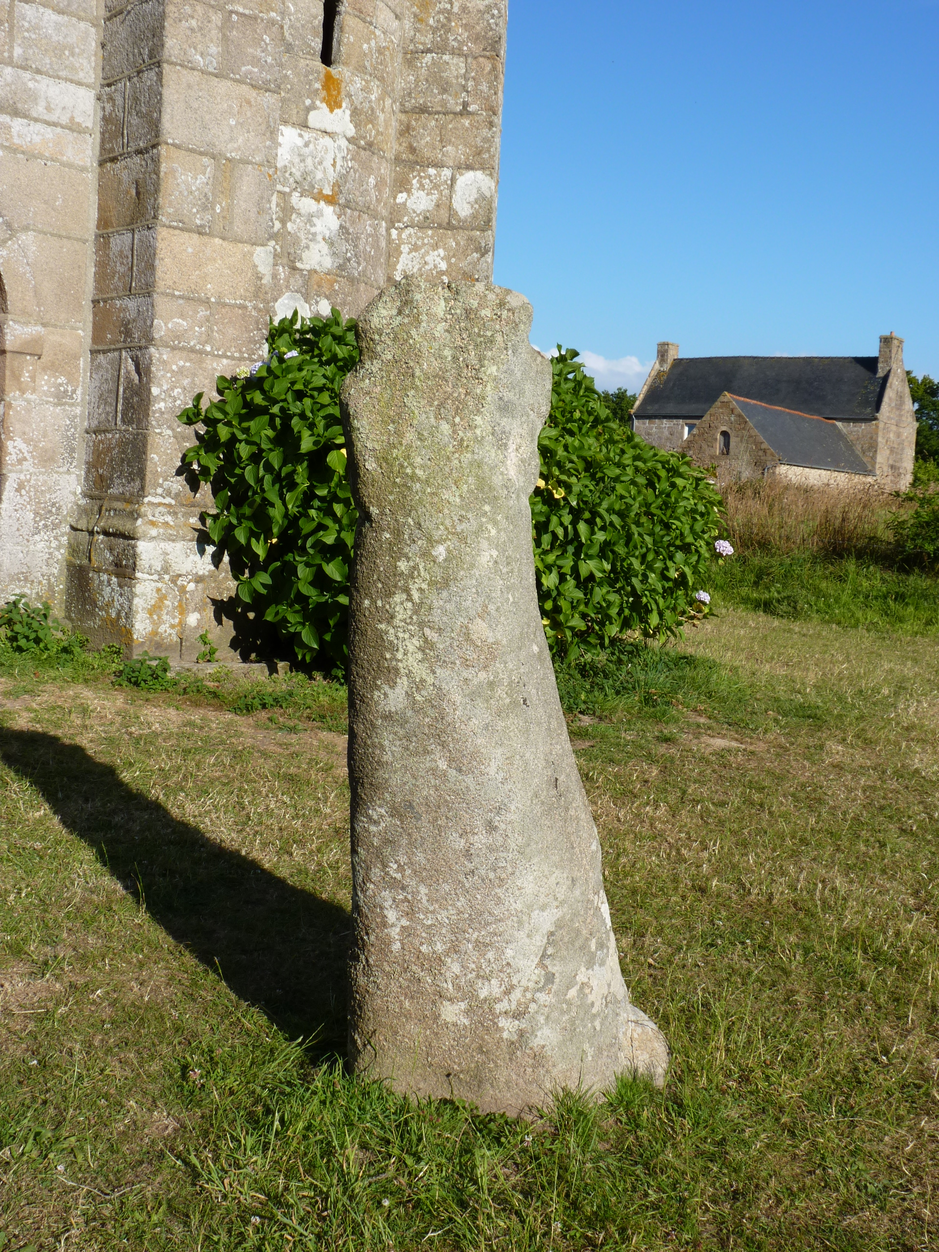 La tentative de christianisation du menhir est visible sous cet angle.